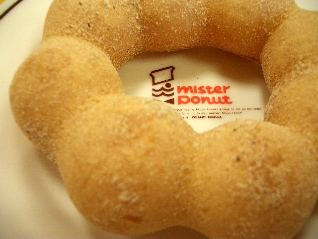 ポンデリングは、モチモチして美味しい＾＾